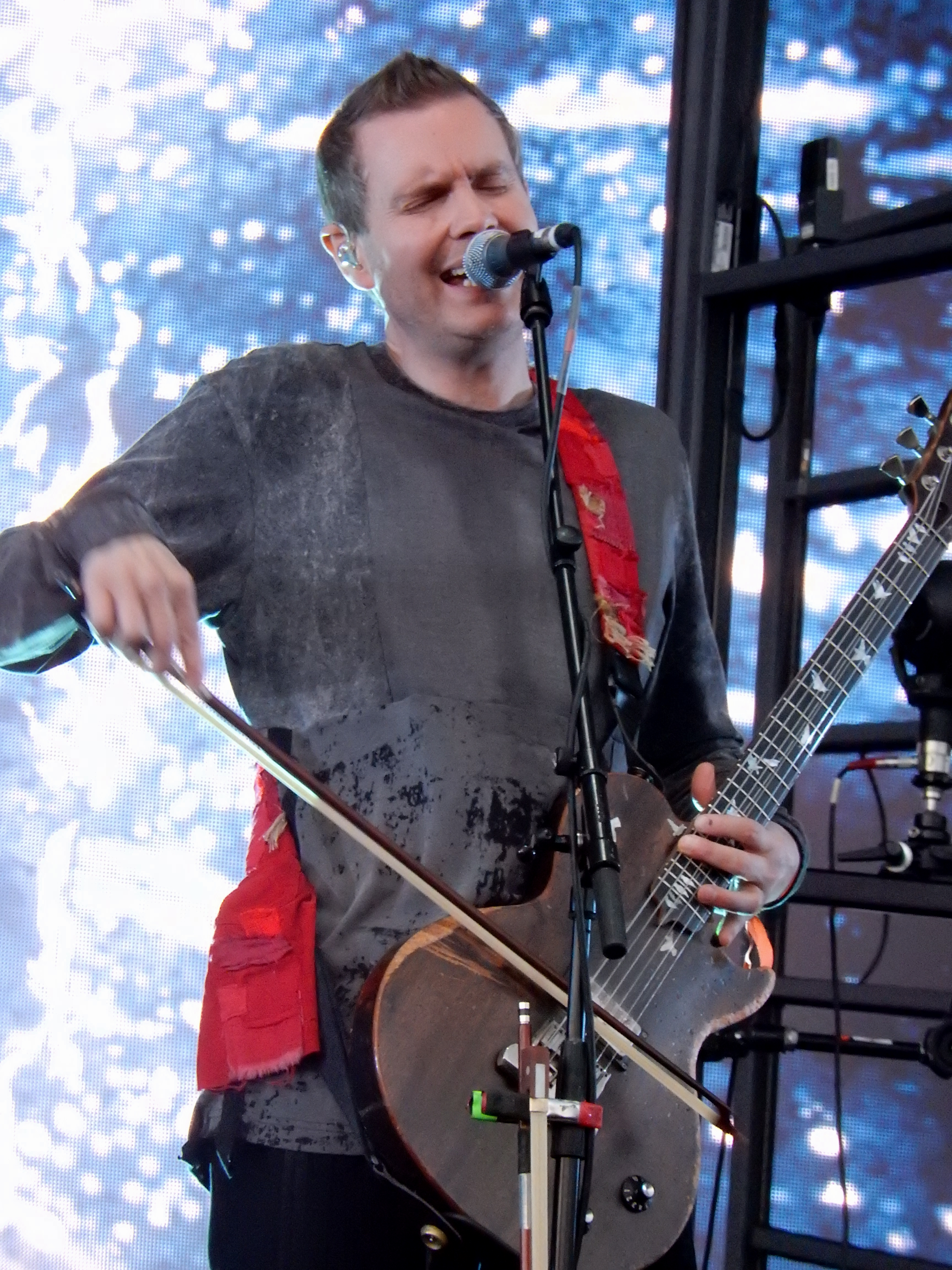 Sigur Rós, Victoria Park, London (Citadel Festival)